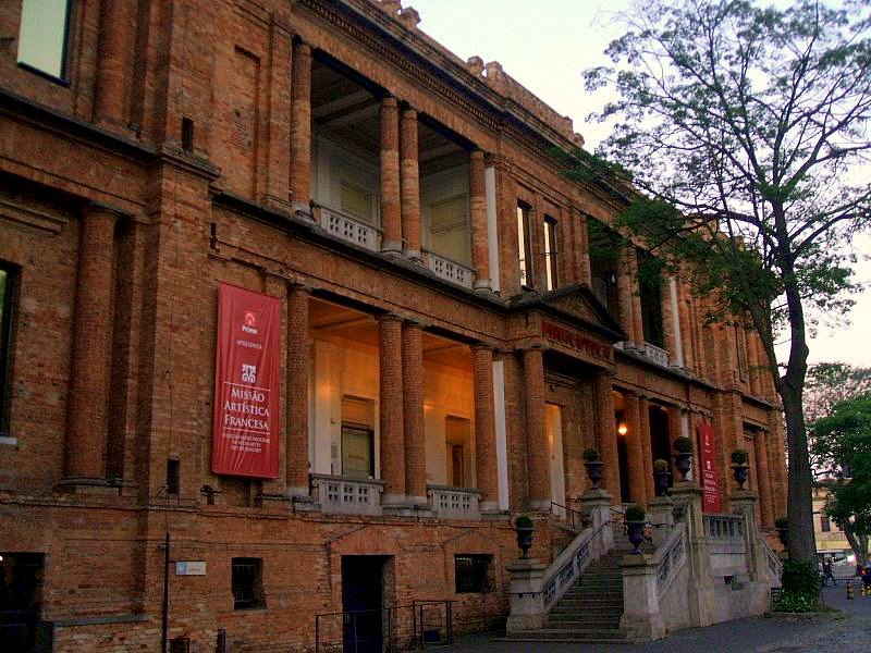 Pinacoteca do Estado de São Paulo )(São Paulo, Brasil)